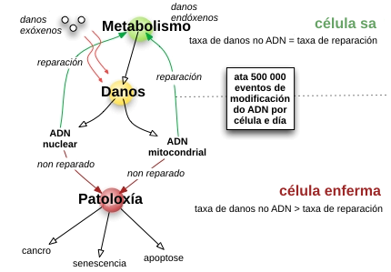 Esquema dos danos e reparación no ADN